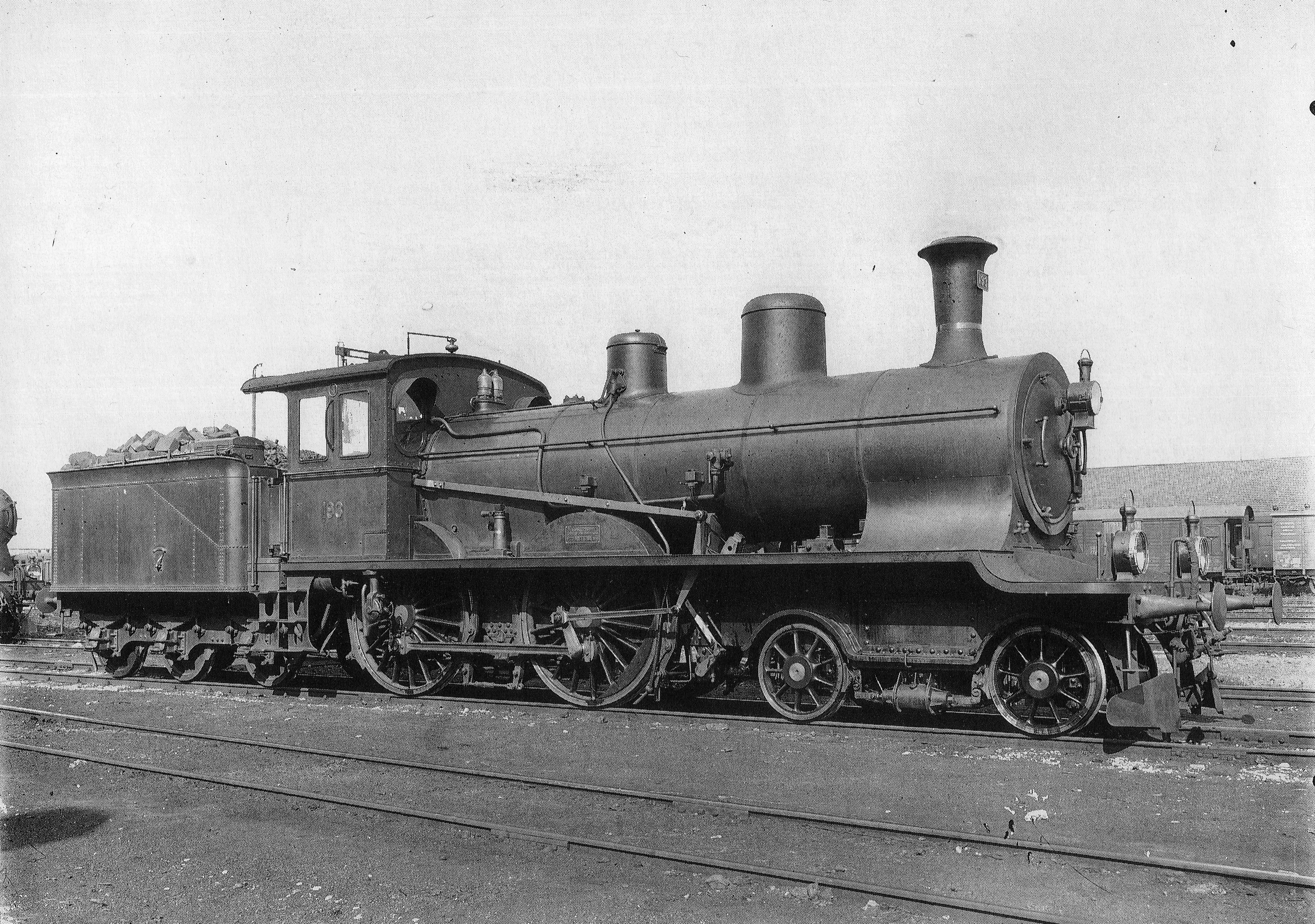 Schnellzuglocomotive Nr. 193 des Typs A 2/4 der Schweizeriſchen Bundesbahnen mit Schlepp-Tender, gebaut 1906 inn der Schweizeriſchen Locomotiv- und Machines-Fabrique zů Winterthur (Fabr.-Nr. 1717), 1924 außer Dienſt geſtellt und anſchließend abgebrochen.